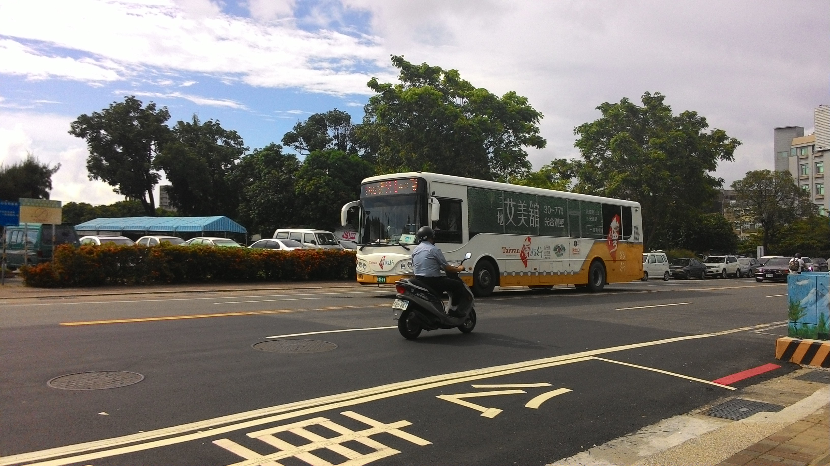 府城客運三菱扶桑RM11FN1XA大客車945-FY，台灣好行塗裝